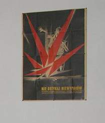 Plakat "Nie dotykaj niewypałów"; Muzeum Wojsk Inżynieryjnych we Wrocławiu, ul. Obornicka 108